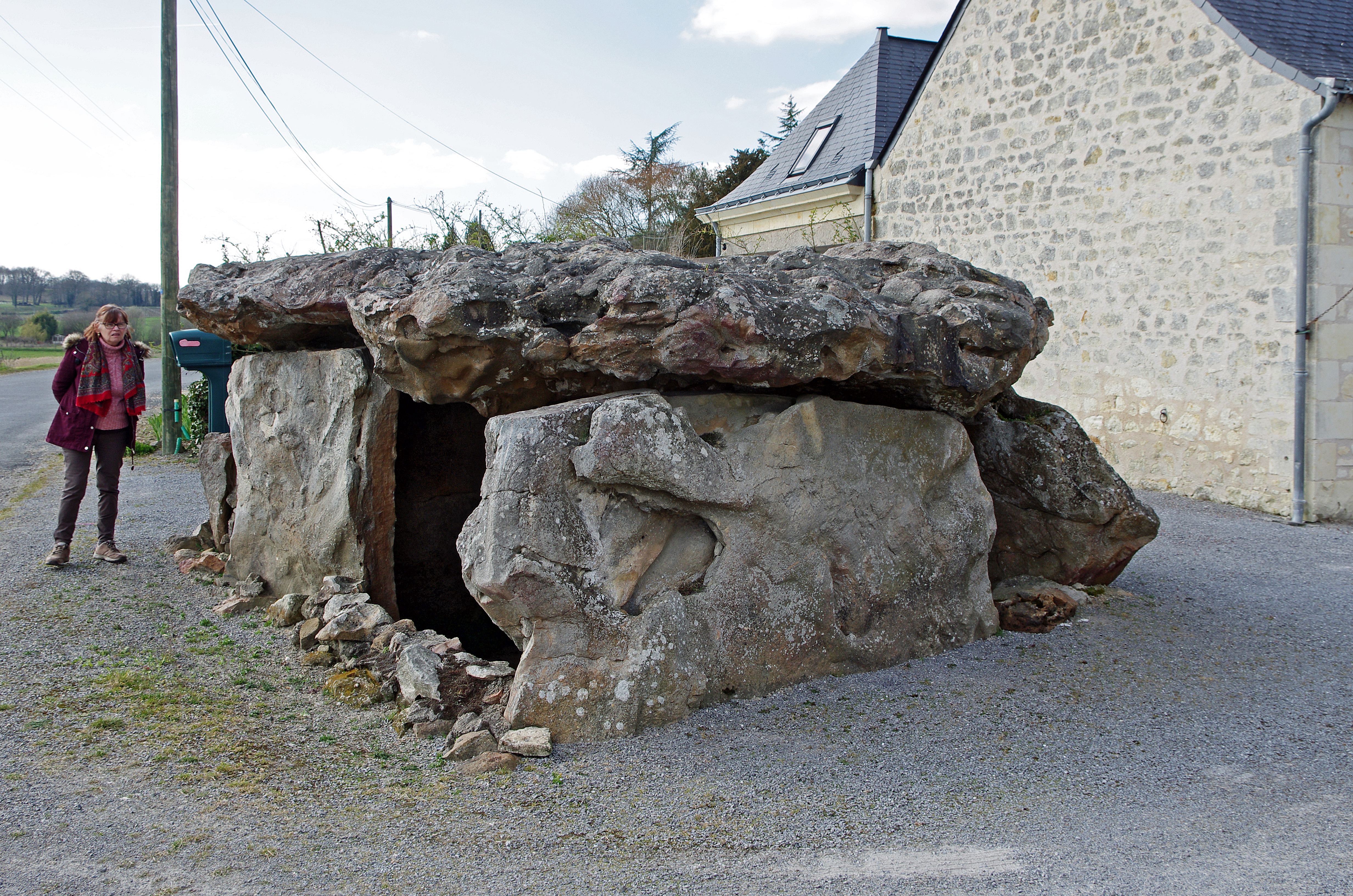 Coutures (Maine-et-Loire) Le dolmen de Montsabert dit dolmen de la Caillère. Il est situé à 400 m du château de Montsabert.